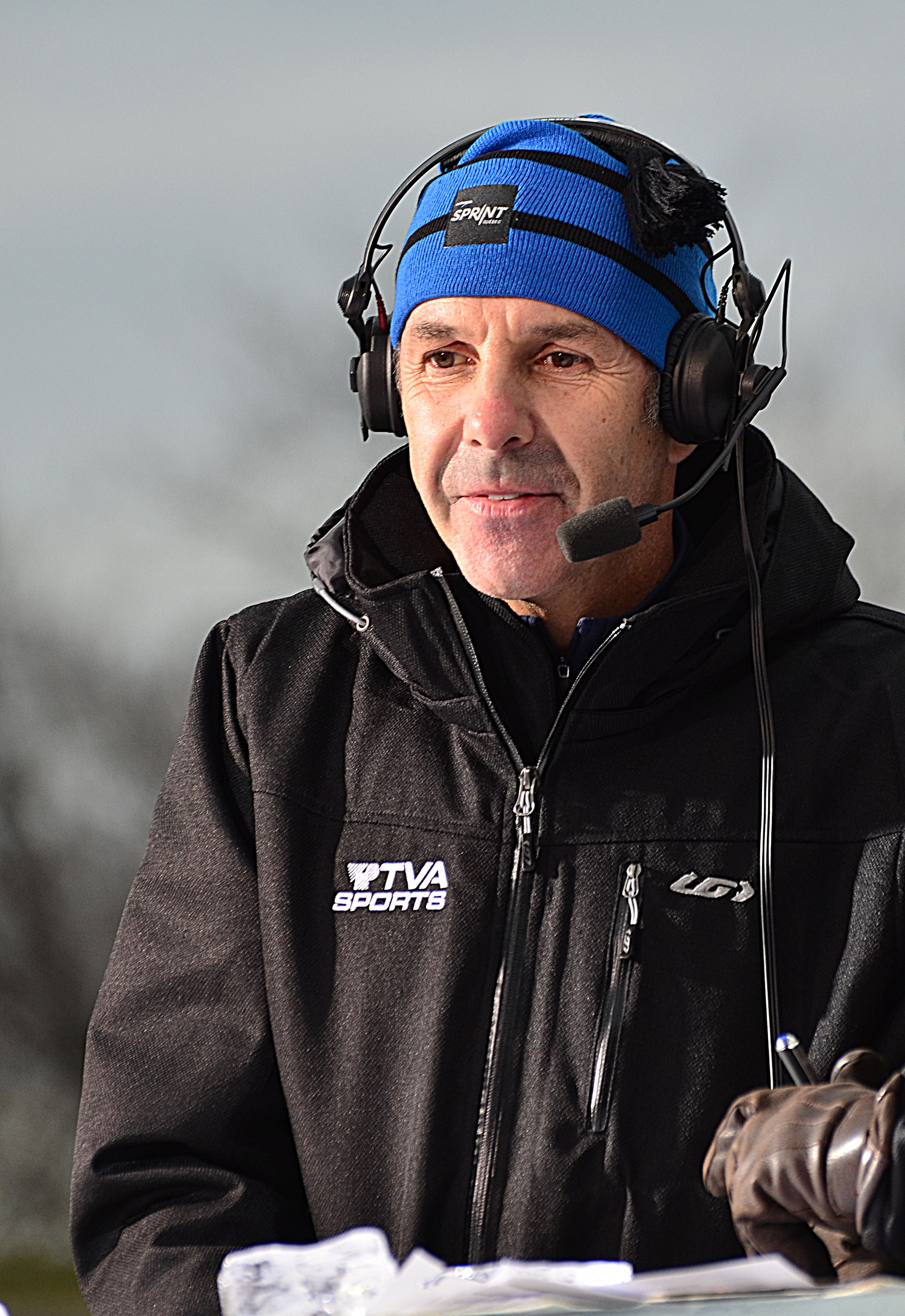 Pierre Harvey en entrevue lors de l'étape de la Coupe du monde de ski de fond sprint de Québec en 2012